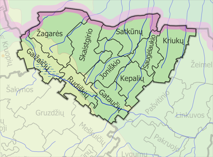 Padaryta iš lt::image:LietuvosSeniunijos.png